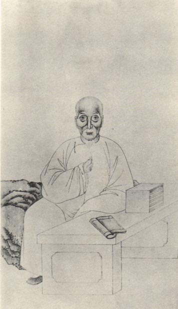 顧廣譽，清代學者。Gu Guangyu